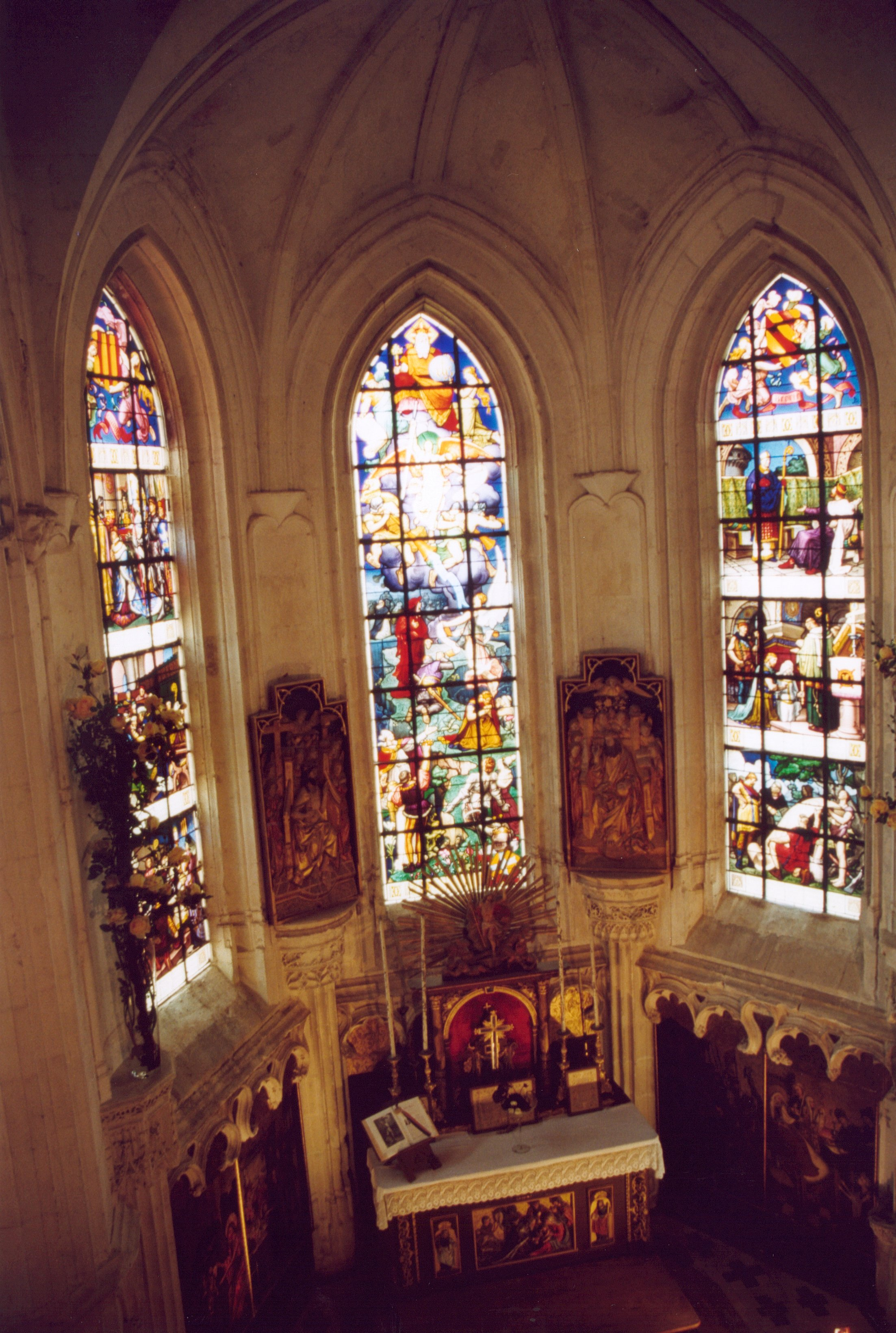 France Loir-et-Cher Chaumont-sur-Loire Château Chapelle Photographie prise par GIRAUD Patrick